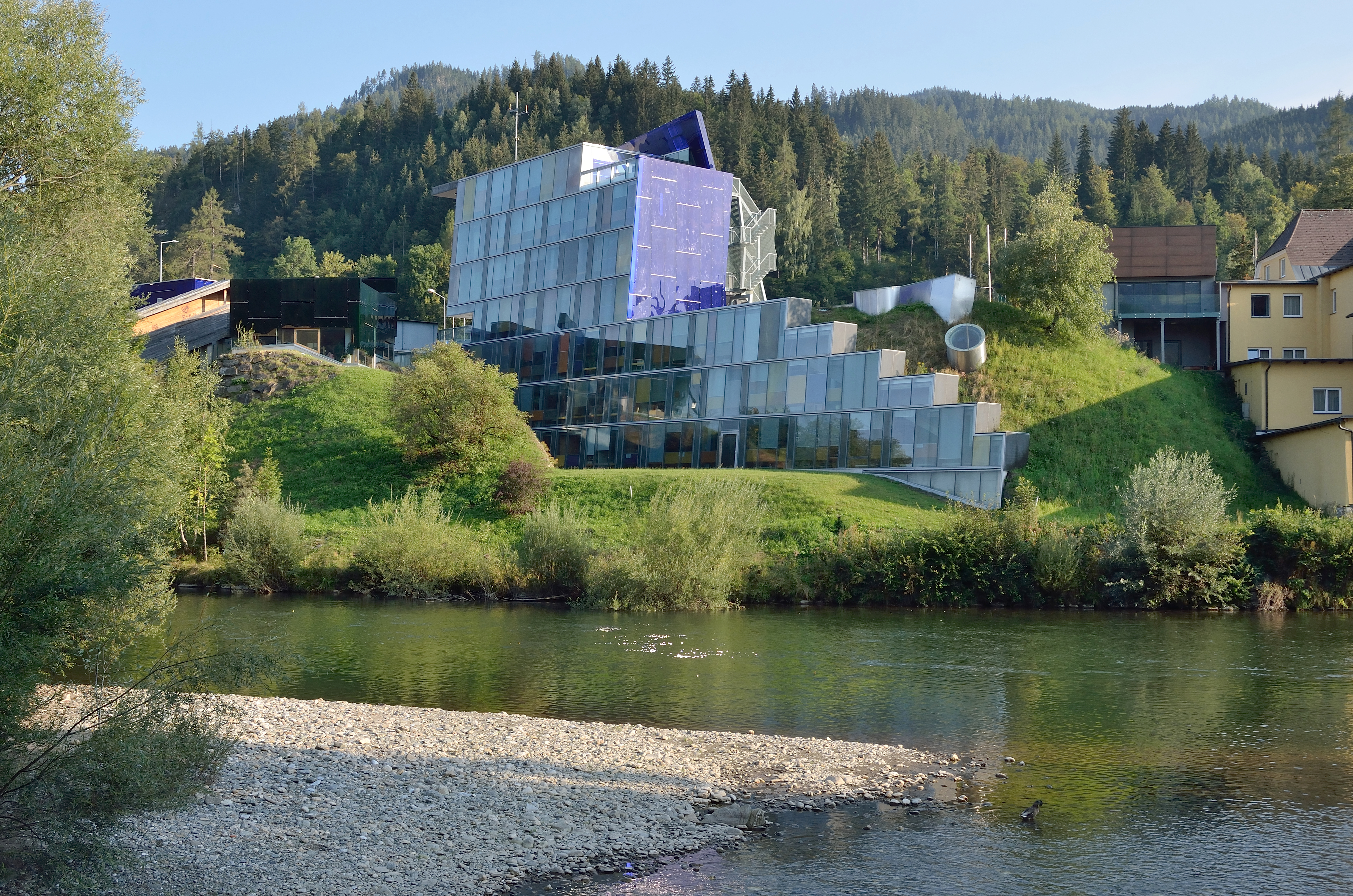 Die Bezirkshauptmannschaft Murau, Steiermark, wurde 2002 nach den Plänen der Architekten Wolfgang Tschapeller und Friedrich W. Schöffauer erbaut. nextroom. Mündung des Rantenbachs in die Mur.